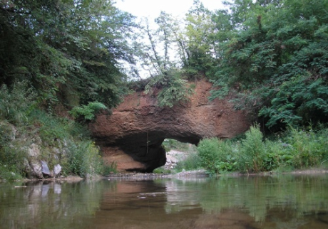 Ponte Naturale sul torrente Mongia. Vista da Fraz. Masentine Lesegno (CN) Italy